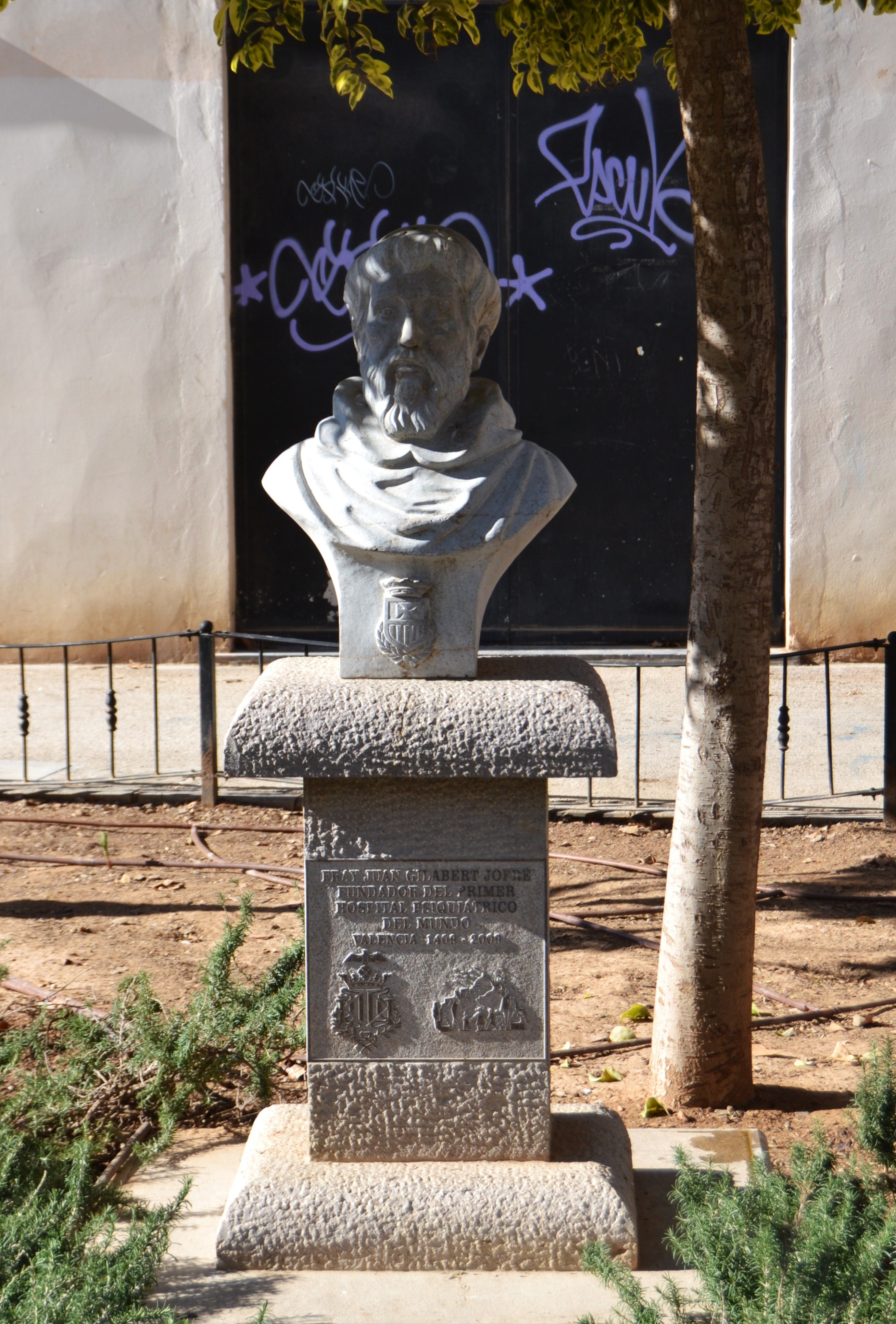 Bust de Joan Gilabert Jofré a l'antic manicomi de Jesús, València.